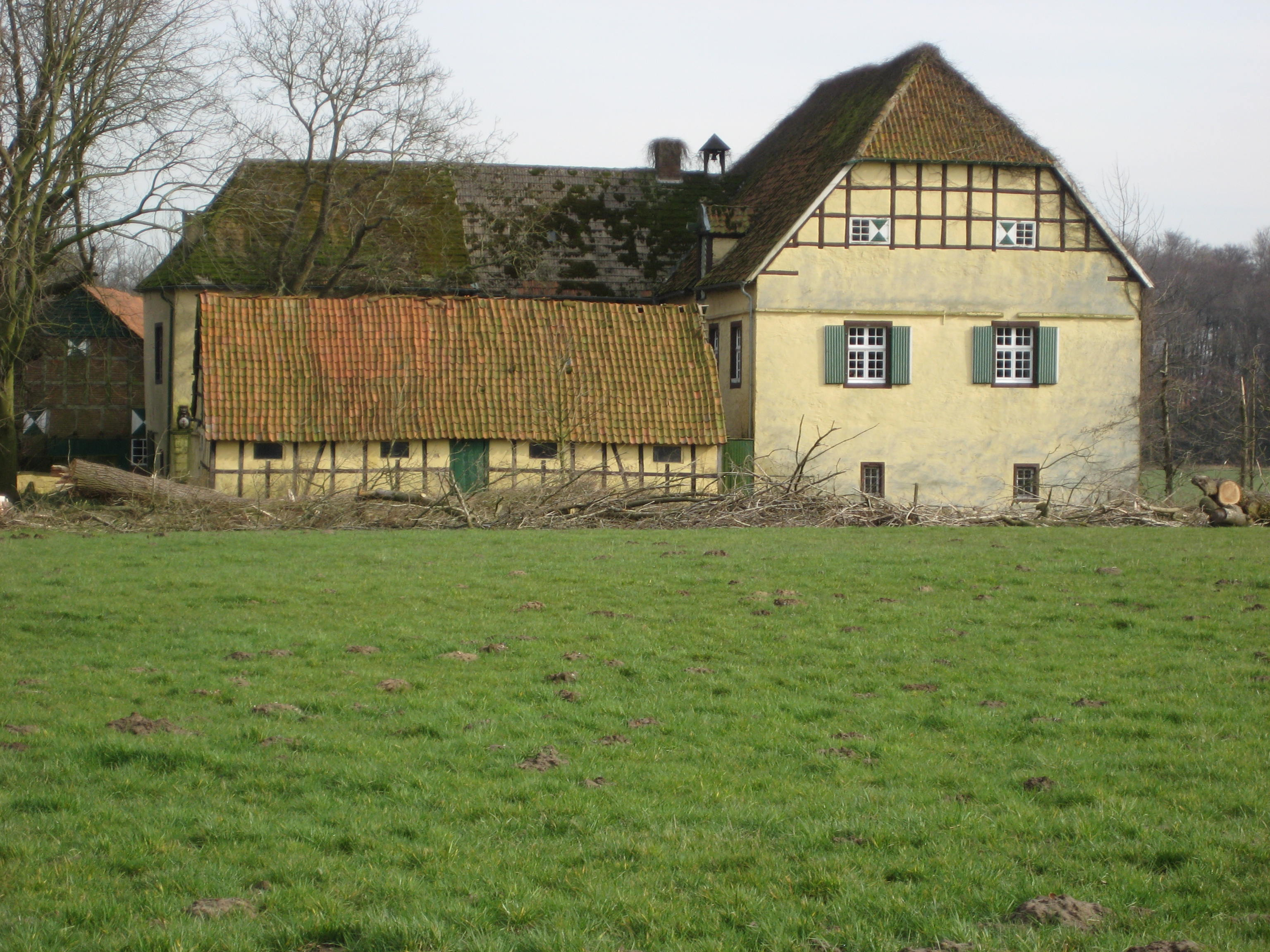 Burg Scheventorf, besseres Bild